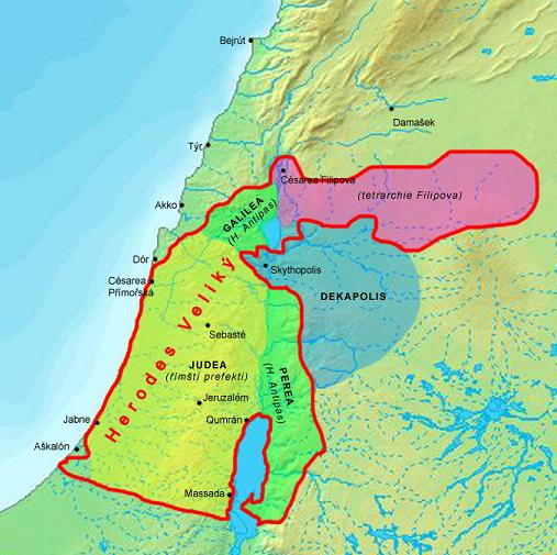 Kenaán za vlády Heroda Velikého a jeho následovníků v první polovině 1. století. Disclaimer: With this statement DEMIS BV grants you permission to freely copy the PNG images returned by our server and use them for your own purposes, including web pages. We would appreciate a reference to our server but such a reference is not required, nor do we take responsibility for the accuracy or quality of the maps.